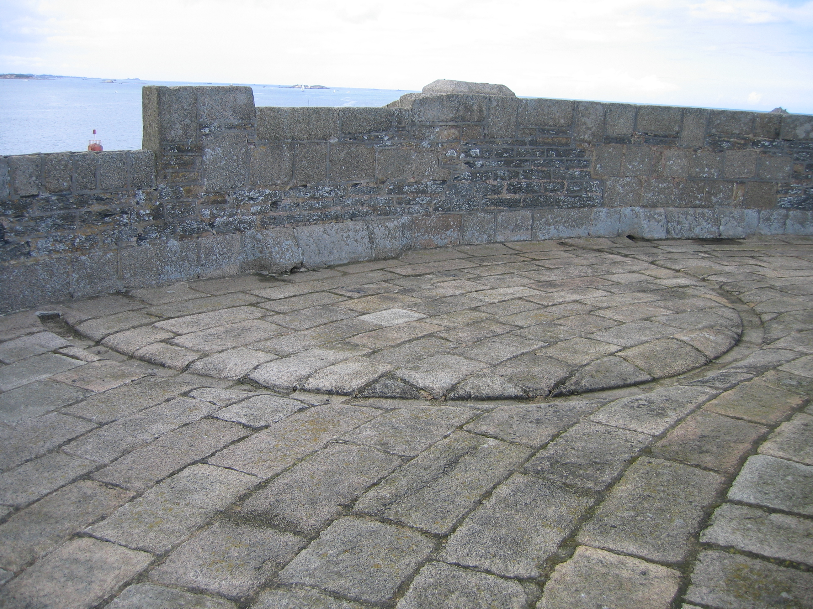 Rainure pour les pièces d'artillerie